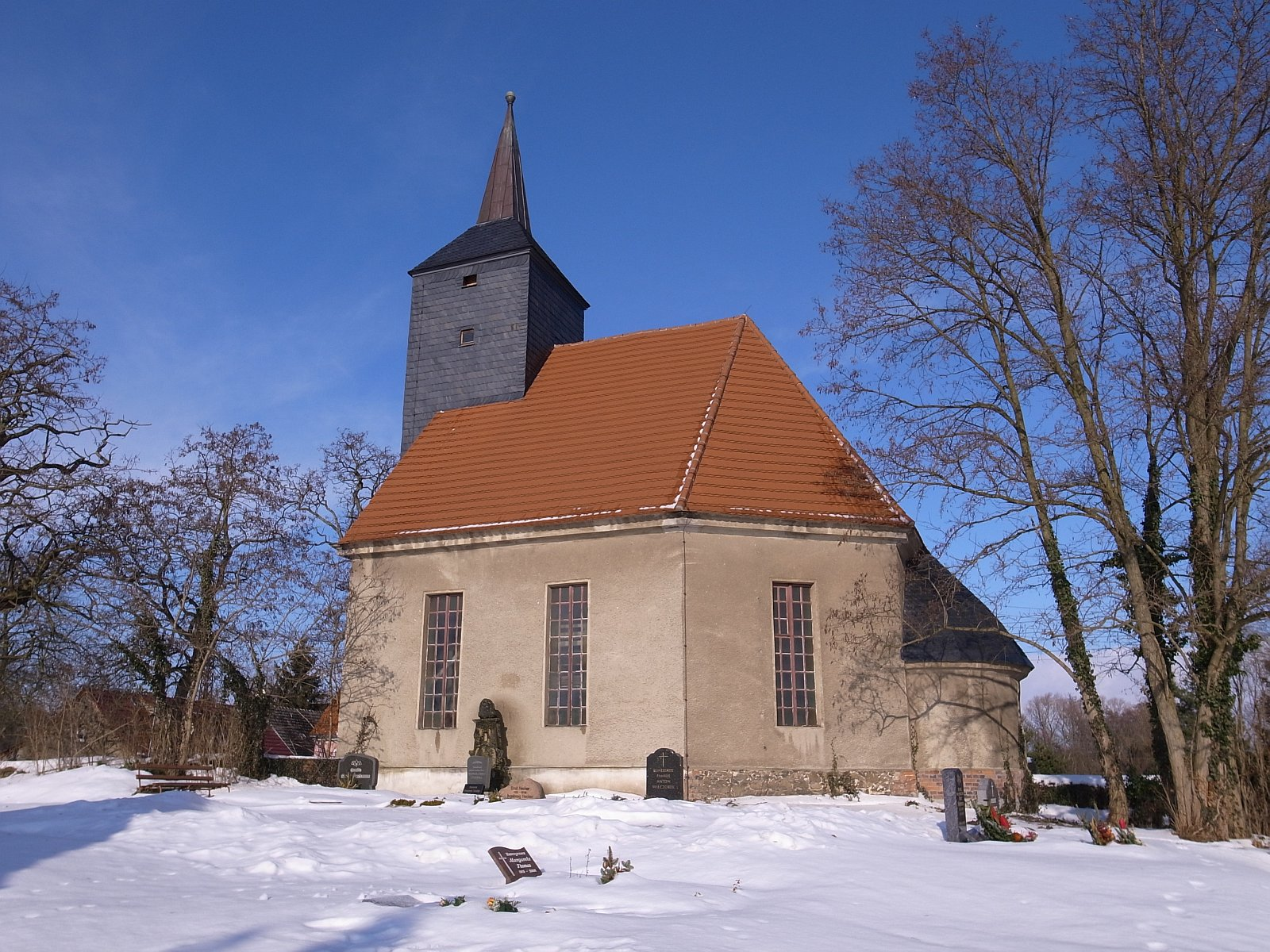 Raguhn-Kleckewitz, Wallstraße; Kirche St. Jakobus. Koordinaten: N51 42.567 E12 18.379